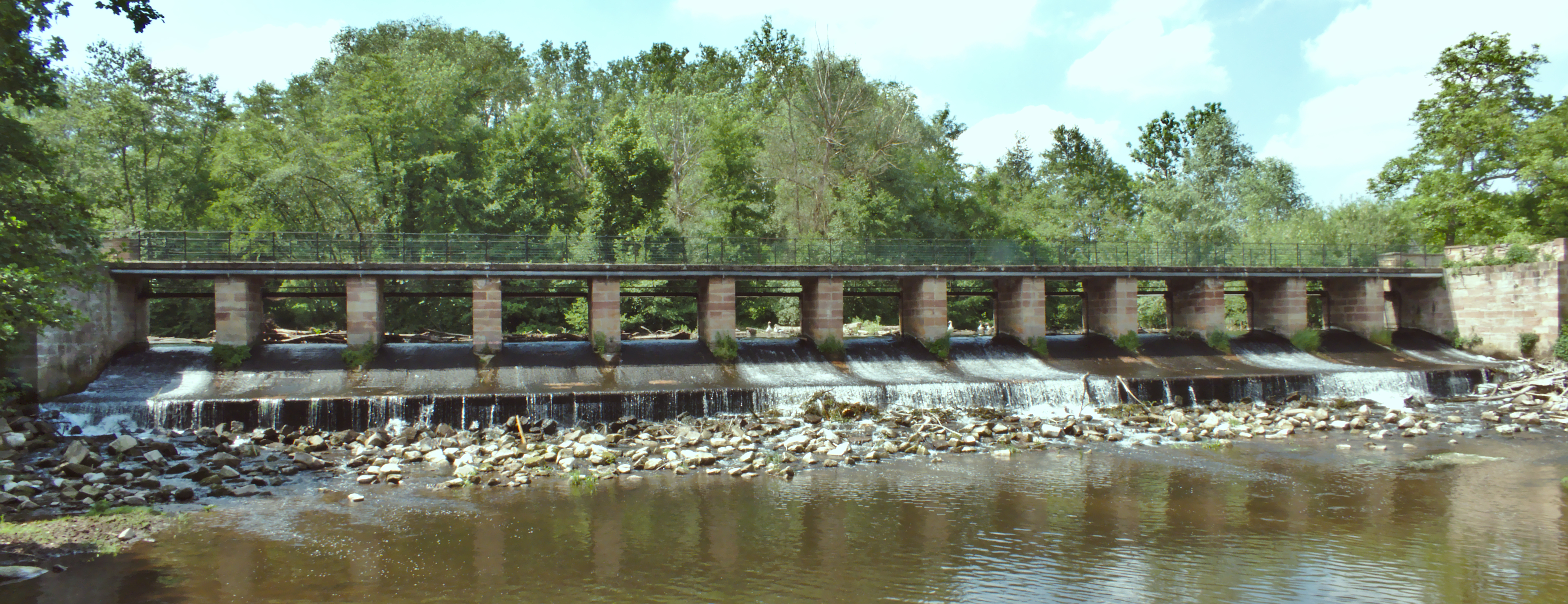 Grand vannage sur la Bruche à Wolxheim - Le Canal